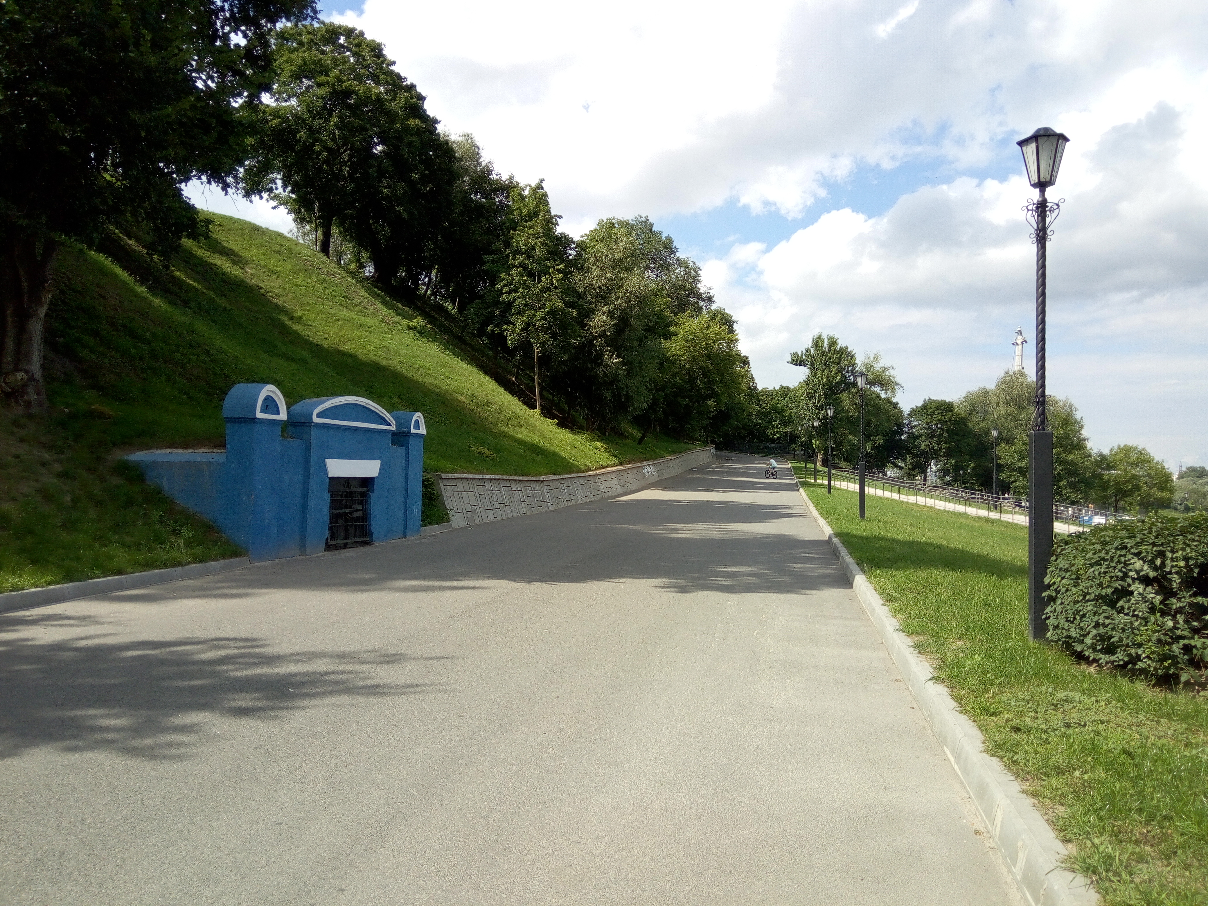 Крушэўскі спуск у Гомелі (ліпень 2018 г.).